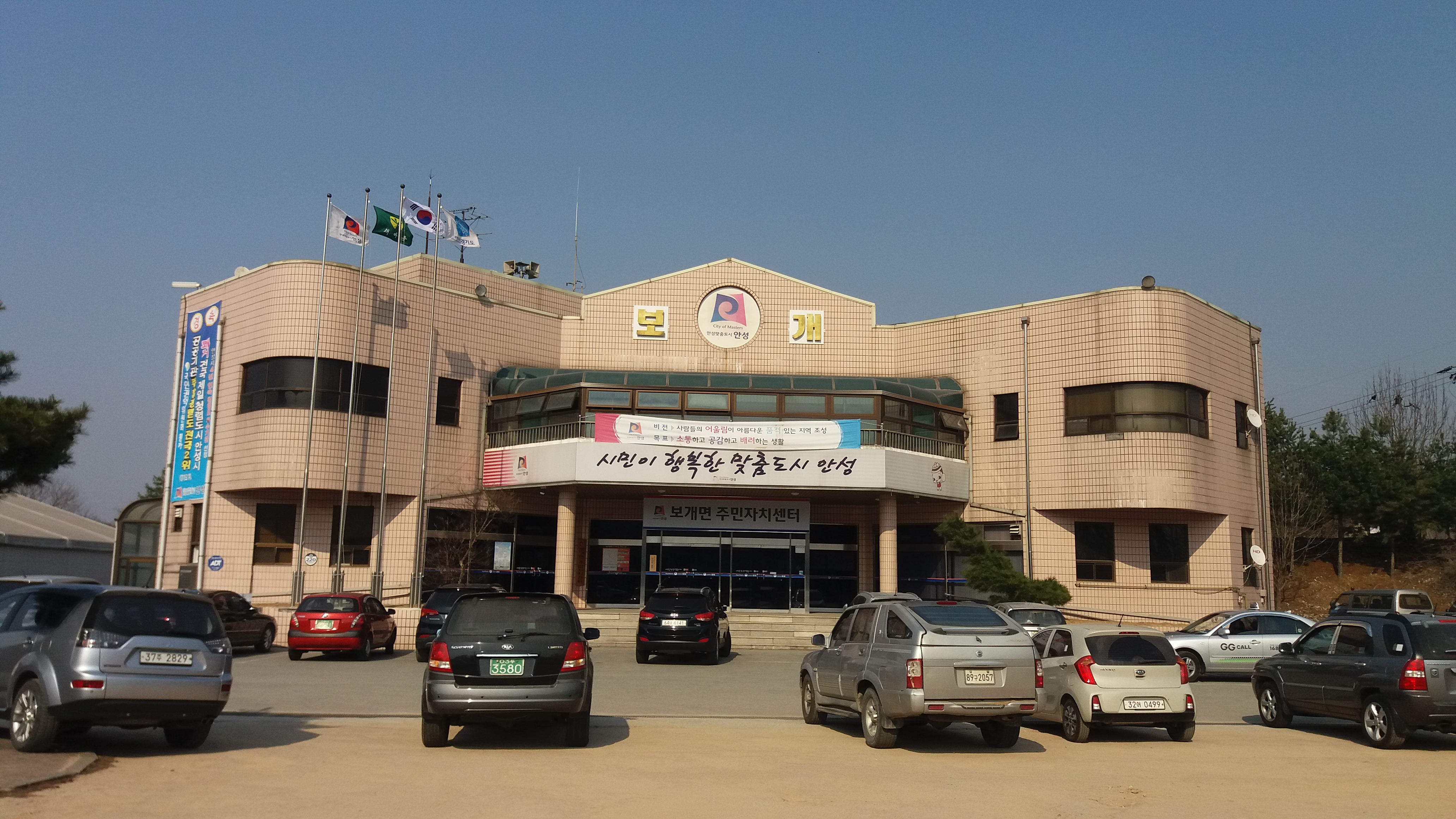 보개면사무소